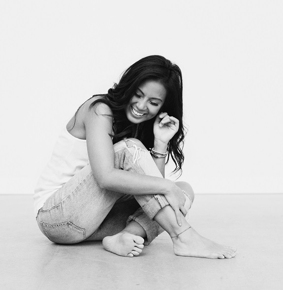 Cheryl Green